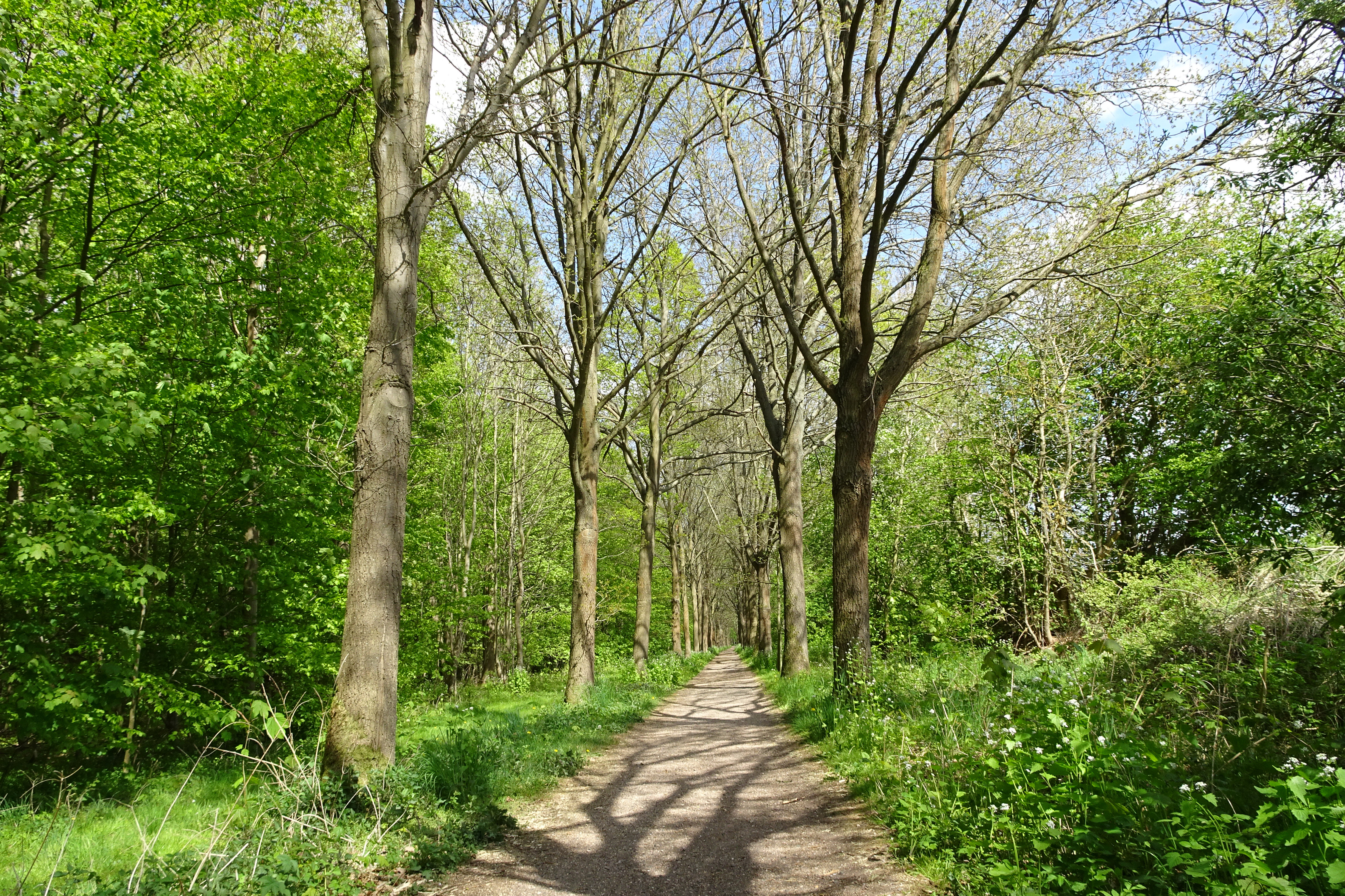 Der „Rhäden bei Obersuhl und Bosserode“ liegt in den Gemarkungen Obersuhl und Bosserode der Gemeinde Wildeck im nordosthessischen Landkreis Hersfeld-Rotenburg. Auslaugungen von Kalisalzen aus dem, aus marinen Sedimenten entstandenem Zechsteinund tektonische Vorgänge haben zu einem schrittweisen Nachsacken des Untergrunds geführt. Die einstige Sumpflandschaft wurde ab der Mitte des 19. Jahrhunderts trockengelegt und bis in die Nachkriegszeit bearbeitet. Mit dem Ausbau der DDR-Grenzanlagen verfiel das Entwässerungssystem, was zur Aufgabe der landwirtschaftlichen Nutzung führte. In den 1970er Jahren begannen Naturschützer mit den Arbeiten zur Rückführung des Rhädens zu einem Feuchtbiotop, um den in ihrem Bestand bedrohten Pflanzen- und Tierarten einen angemessenen Lebensraum zu sichern. Nach abgeschlossener Rekultivierung war (wieder) eine Auenlandschaft entstanden, die vor allem für Vogelarten als Brut-, Nahrungs- und Rastgebiet überregionale Bedeutung besitzt.